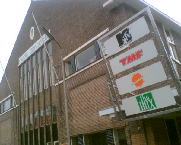 Studio Concordia te Bussum. Destijds bezet door MTV Networks Benelux.